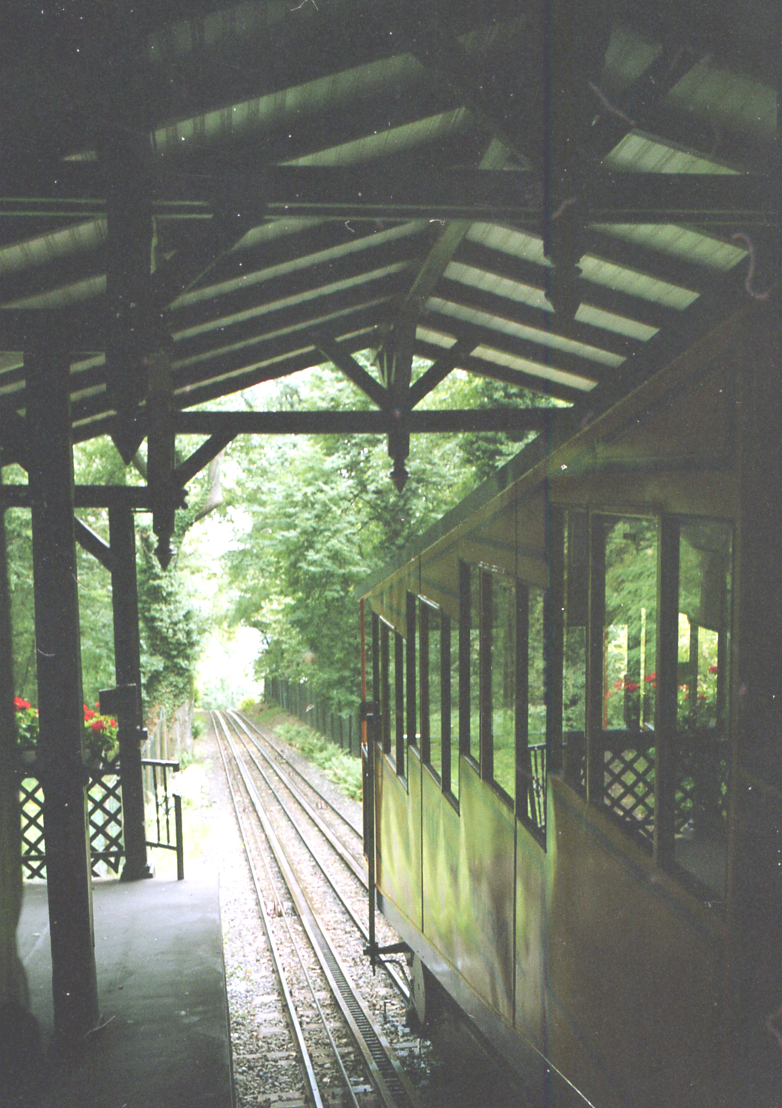 Общий вид фуникулёра в Висбадене